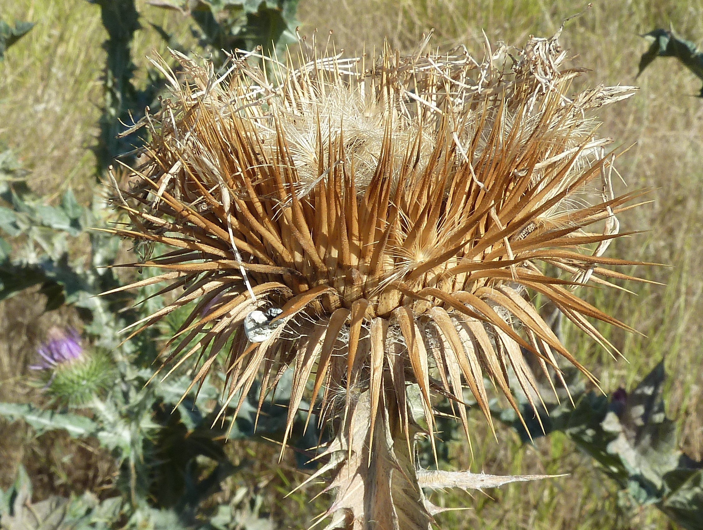 Onopordum acanthium var. acanthium - Capítulo en fructificación con cipselas in situ. - Circa Estación de Contenedores de RENFE/ADIF de Abroñigal/Embajadores, Madrid (España).